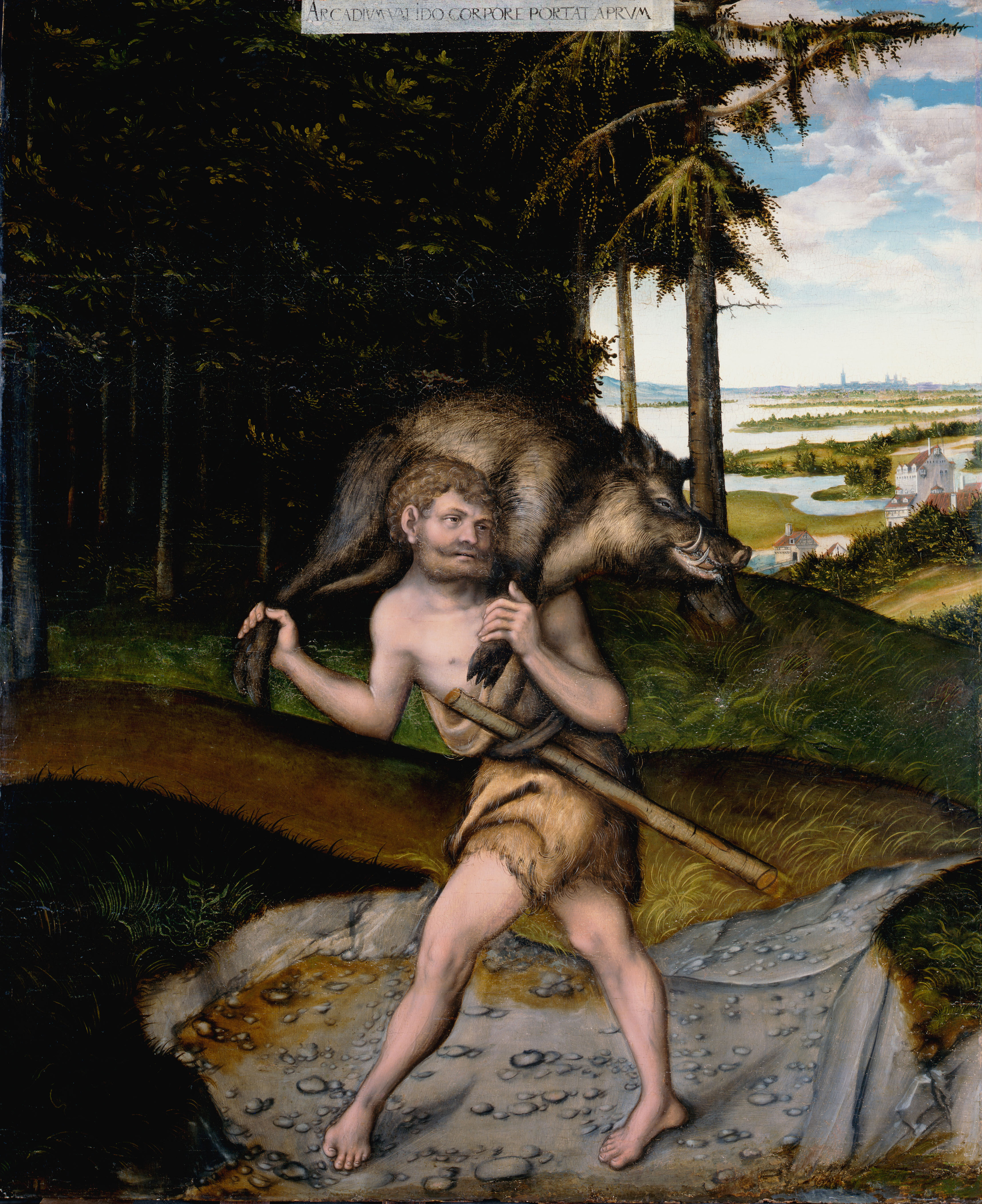 Bildfolge zur Herkules-Legende